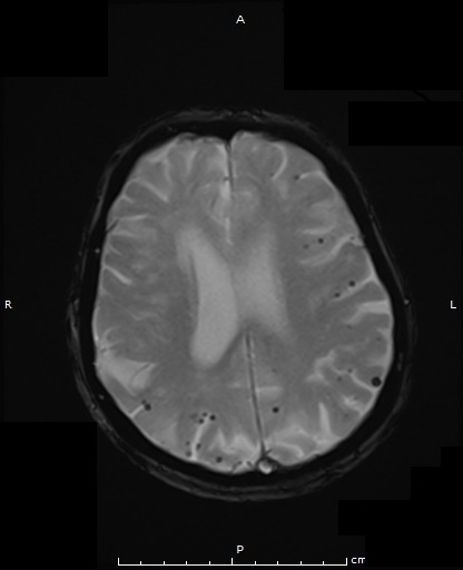 MRT des Gehirns bei zerebraler Amylodiangiopathie. Dargestellt ist ein Bild aus der T2* Gradientenechosequenz. Man sieht viele kleine schwarze punkte, die Mikroblutungen ensprechen. Diese sind im Gegensatz zu Blutungen bei Blutzhochdruck nicht zentral sondern peripher angeordnet. Damit handel es sich um das typische Bild einer zerebralen Amyloidangiopathie.